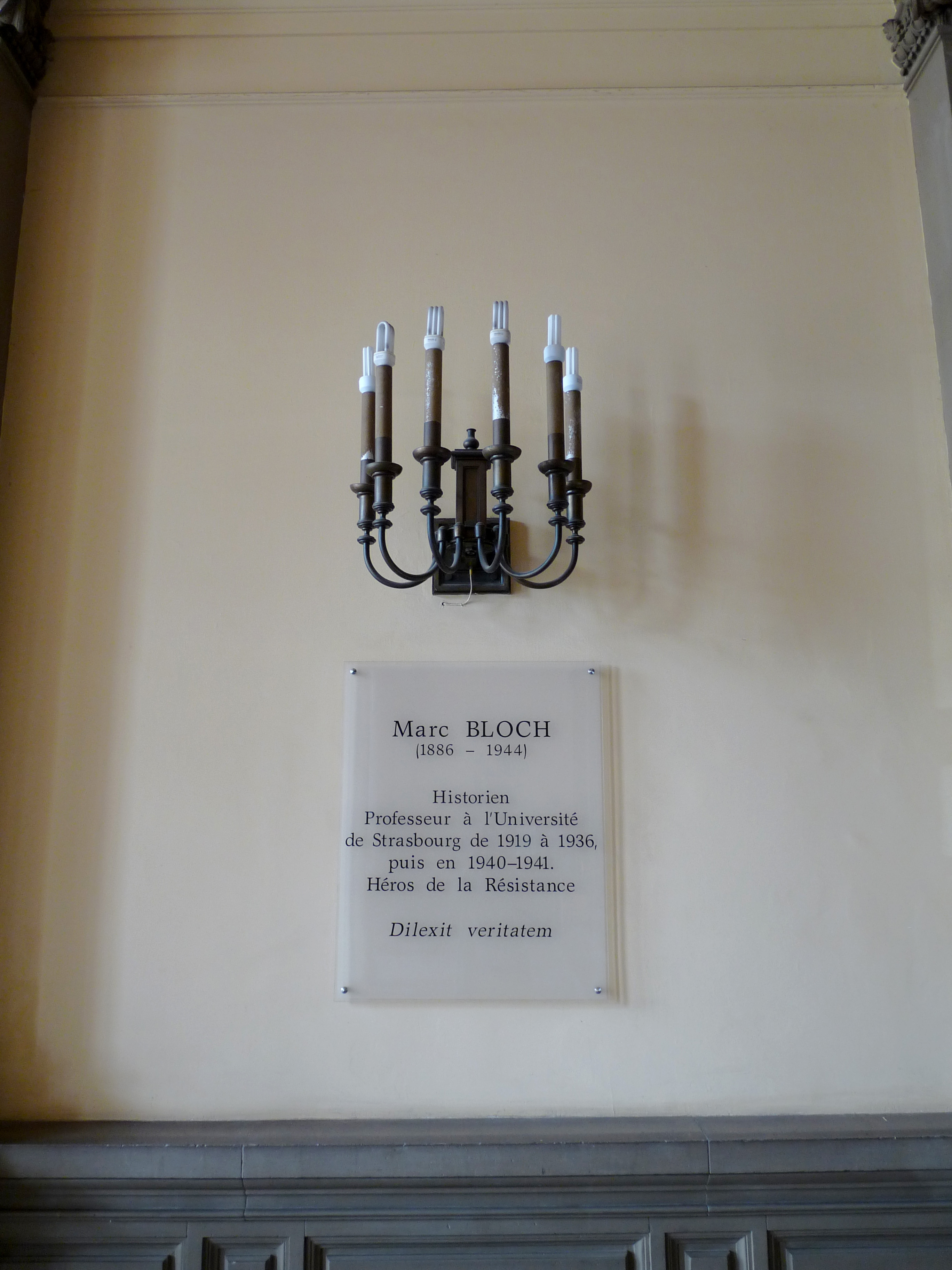 Plaque à la mémoire de Marc Bloch à l'entrée du Palais Universitaire de Strasbourg (ex-Université Marc Bloch)